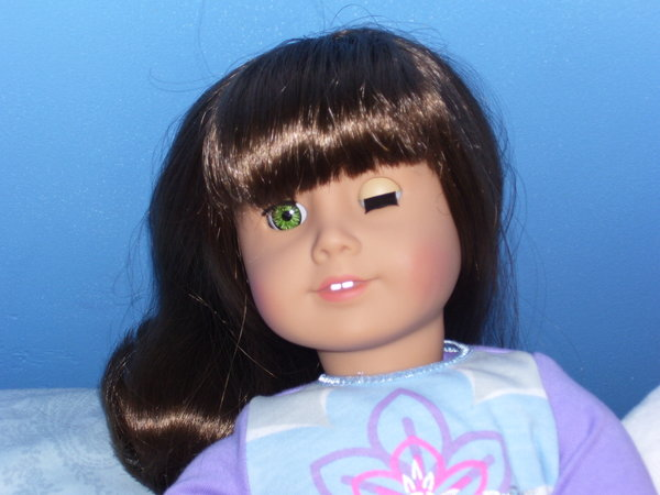 net ernstgemeint.